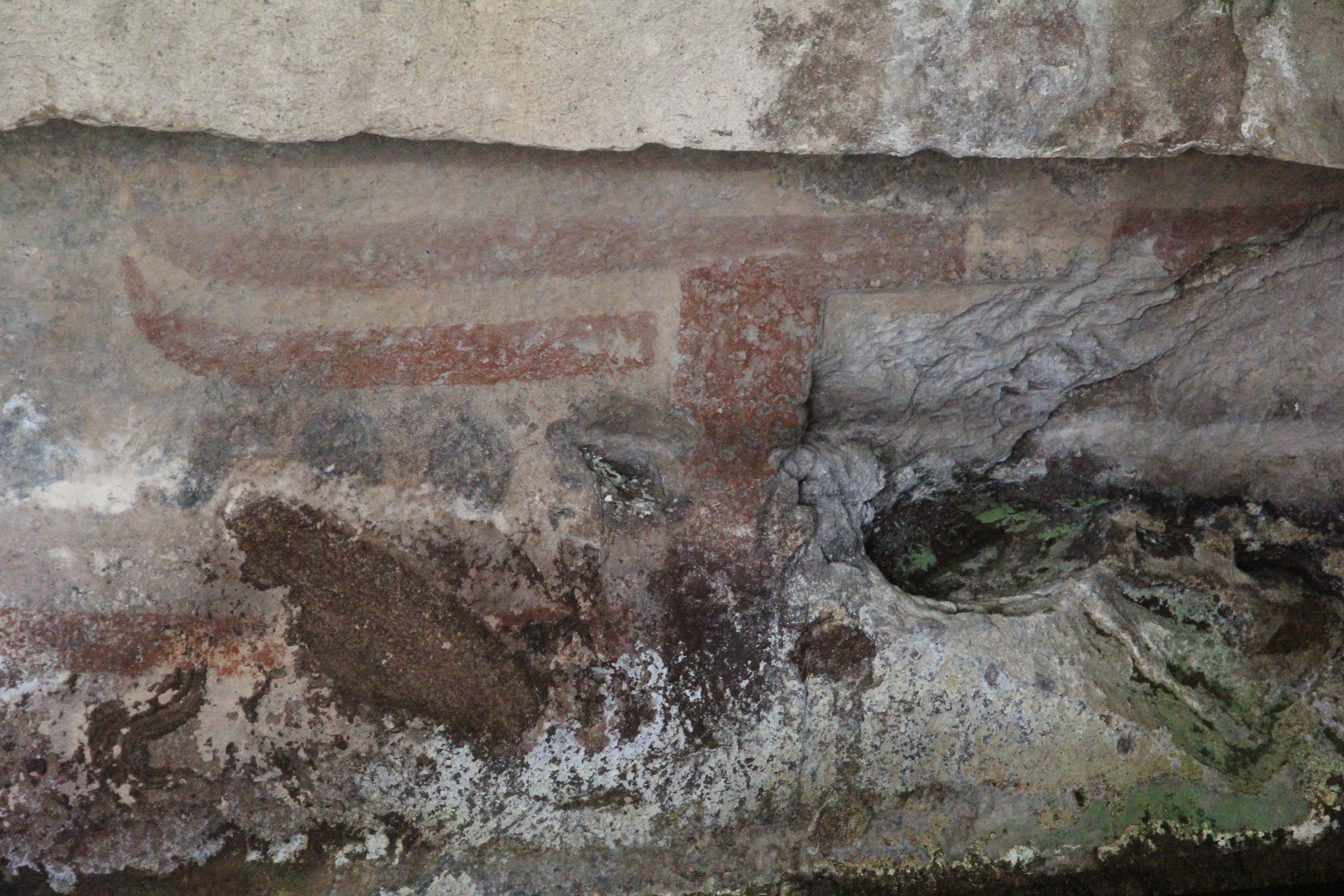 Necropoli di Mandra Antine